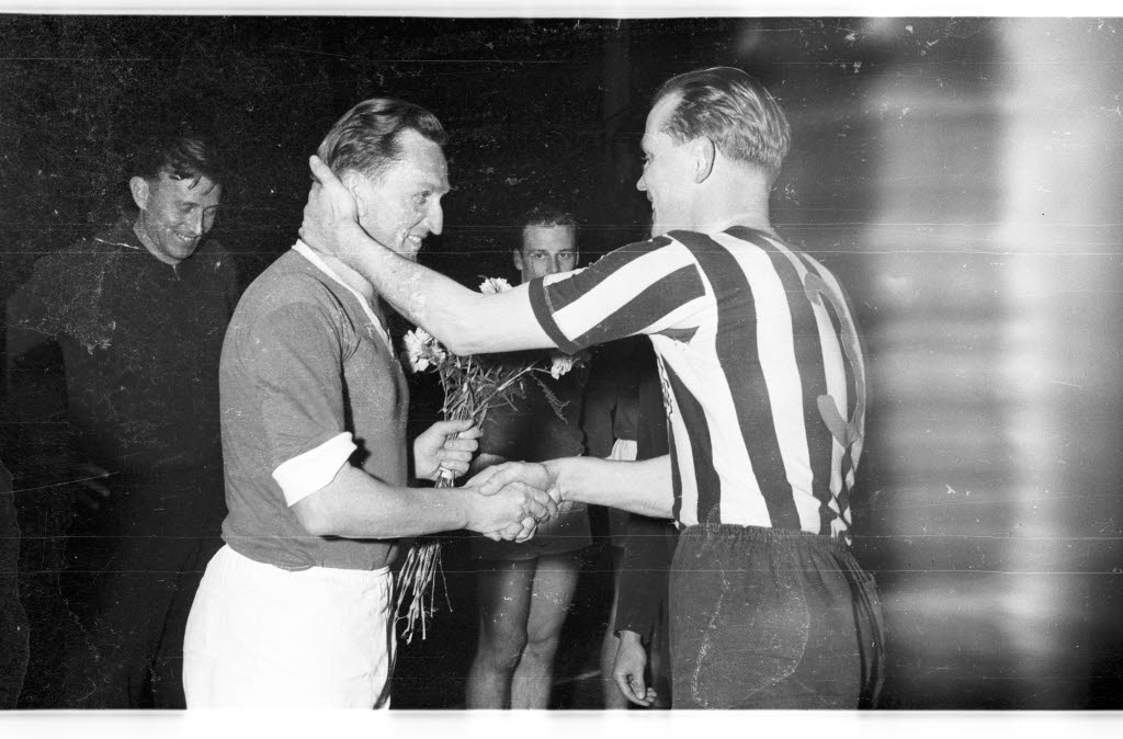 in der Ostseehalle. Im Bild u.a. Handballspieler Bernhard Kempa (links) vom Frisch auf Göppingen und THW-Spieler Heinrich Dahlinger (rechts).